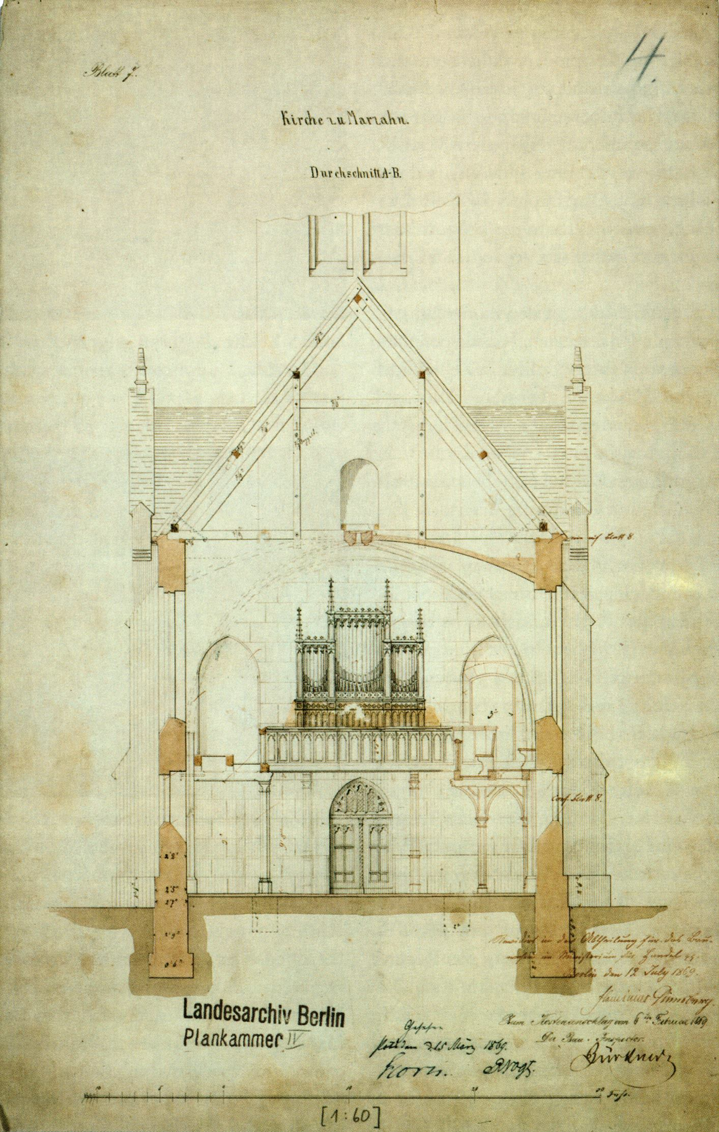 Berlin - Dorfkirche Marzahn, Schnitt durch die Kirche, Beilage zum Kostenvoranschlag vom 6. Februar 1869